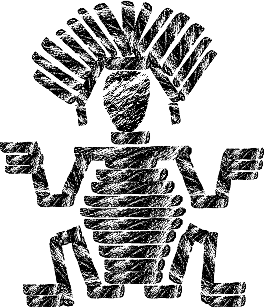 gran pajaten-juanjui